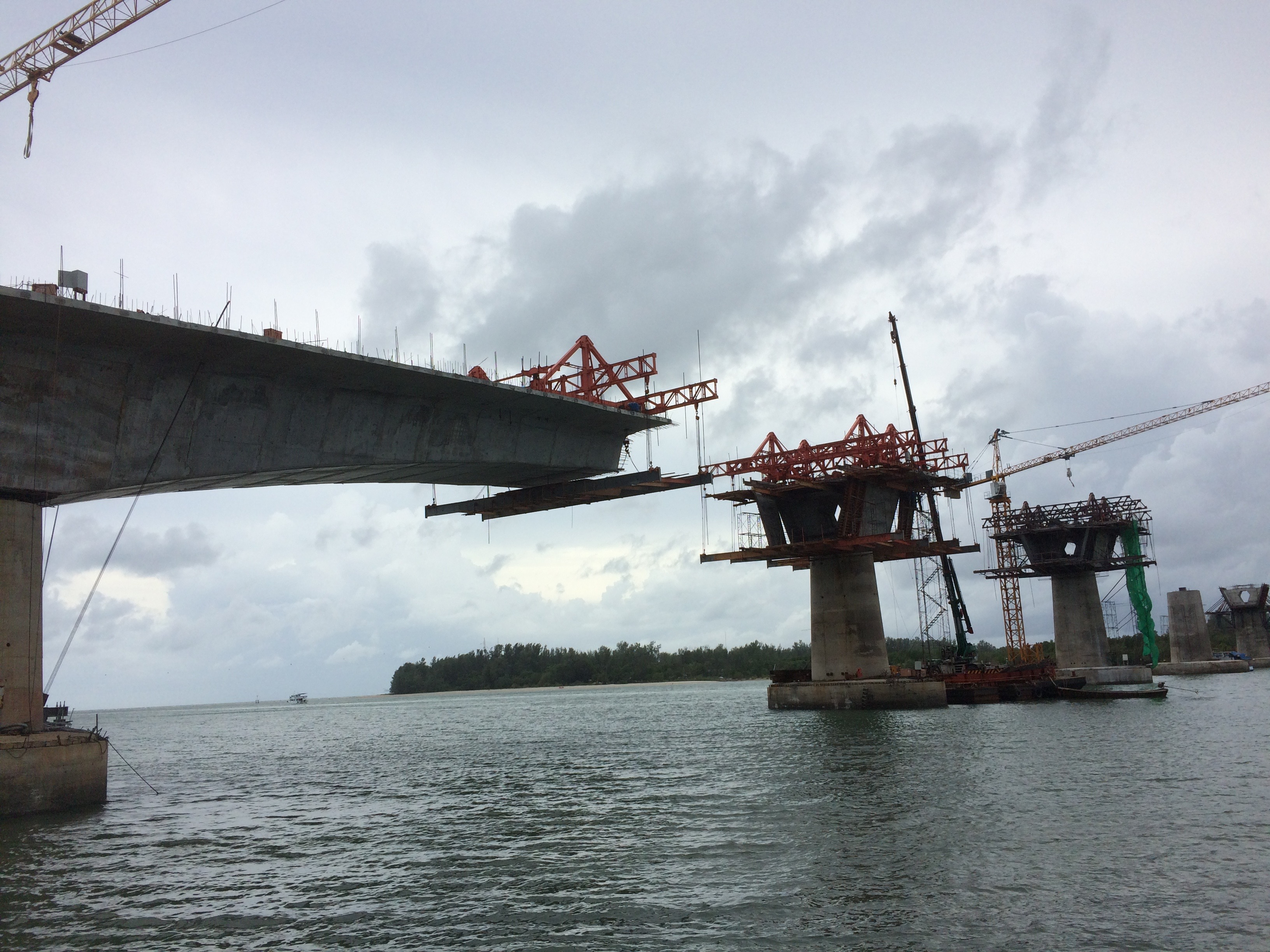 Pont en construction en août 2015 entre les Iles de Koh Lanta Noi et Koh Lanta Yai en Thaïlande, province de Krabi.